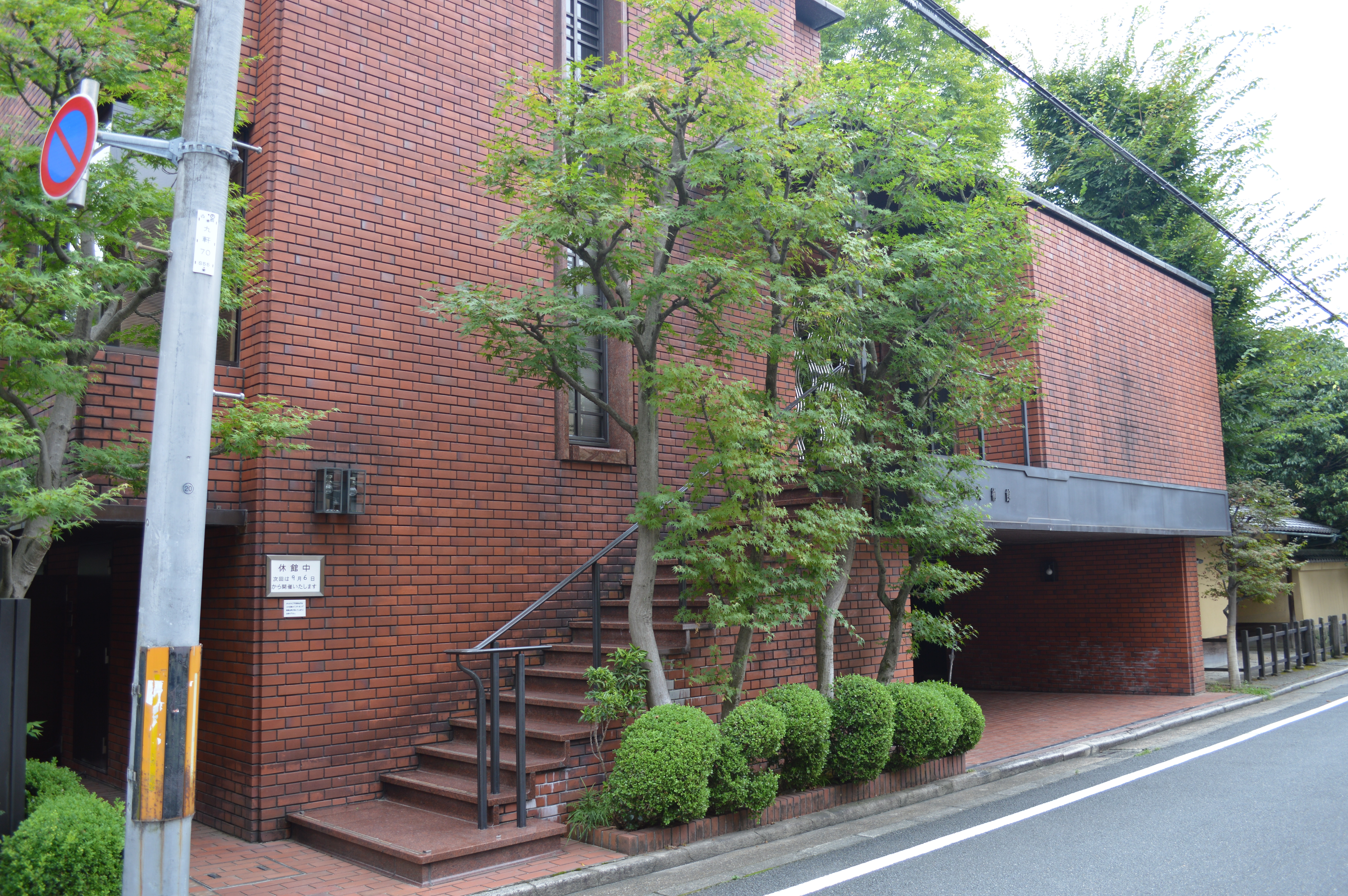 京都市上京区にある北村美術館